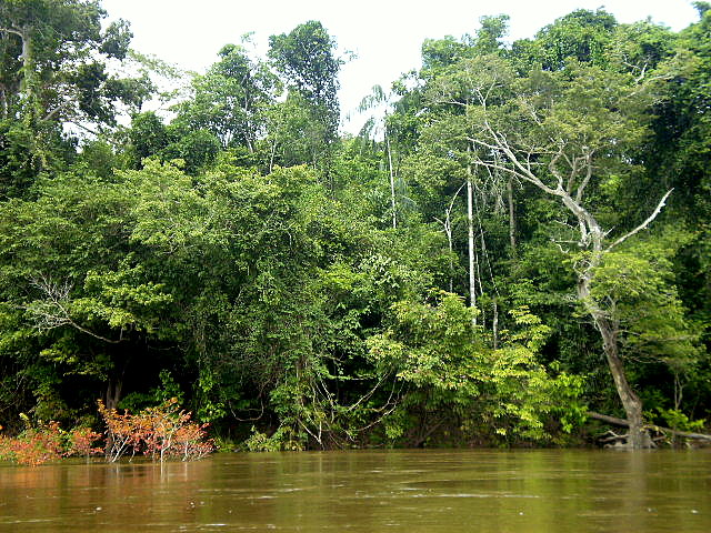 Comunidade clímax em floresta amazômica